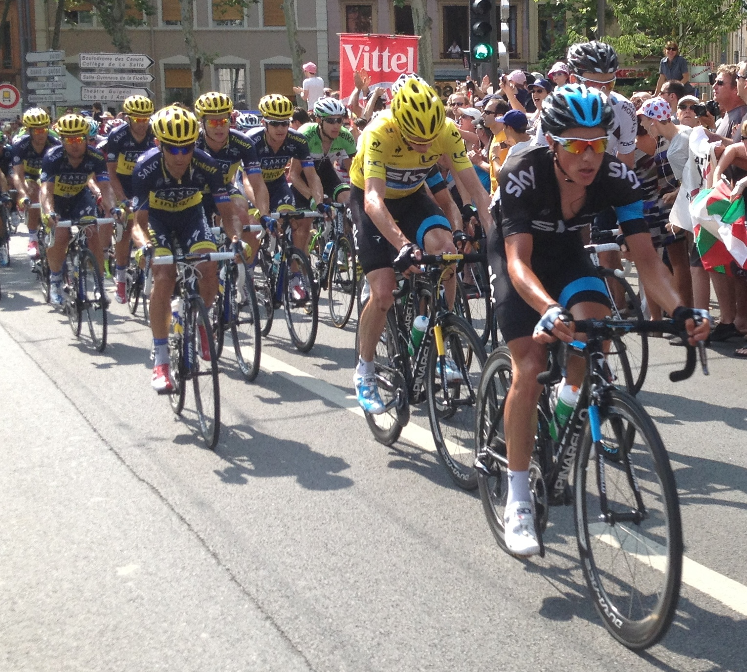 Etape 14 du Tour de France 2013.